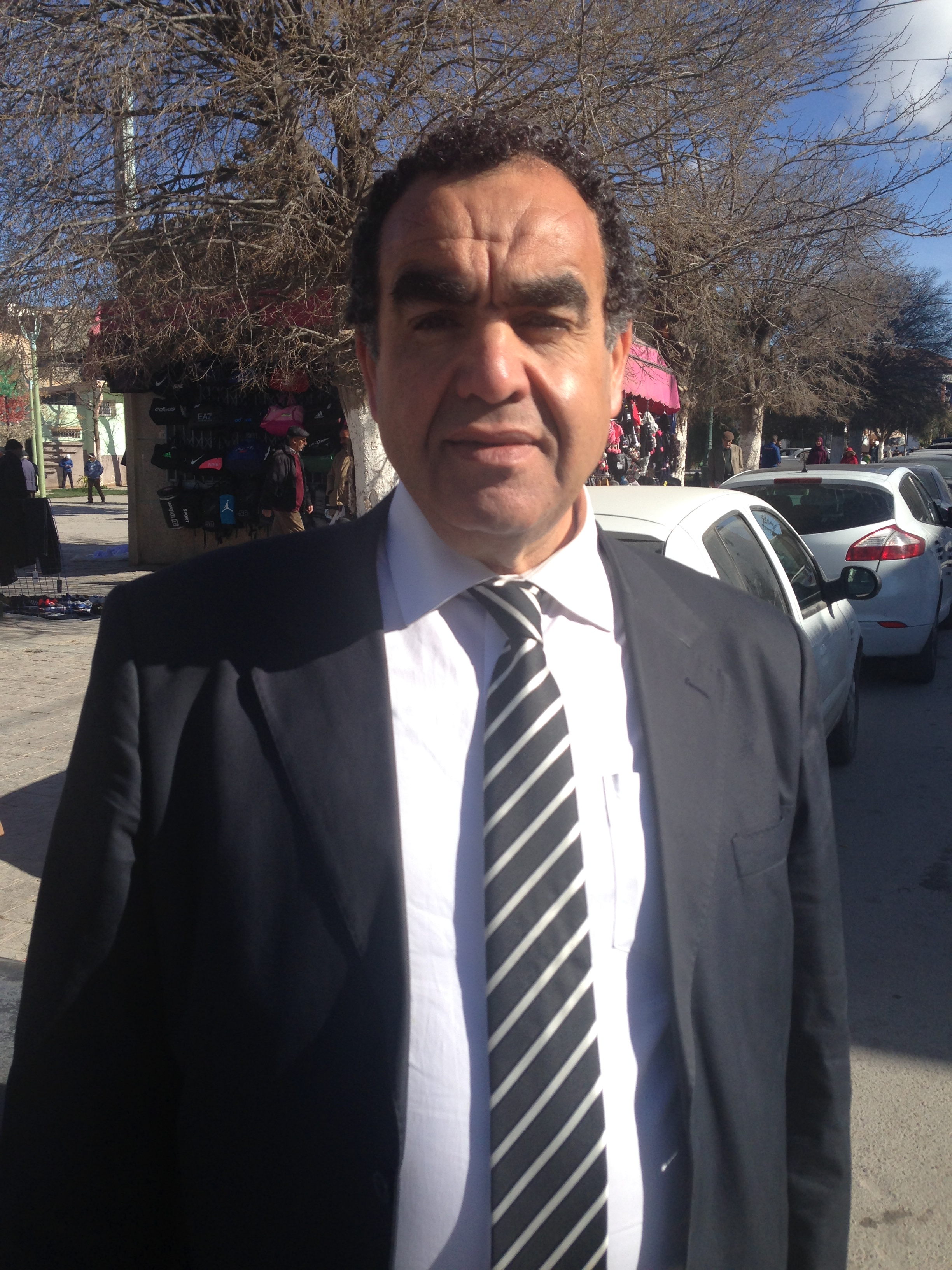 Bouamra du groupe de musique El Kahina de Batna